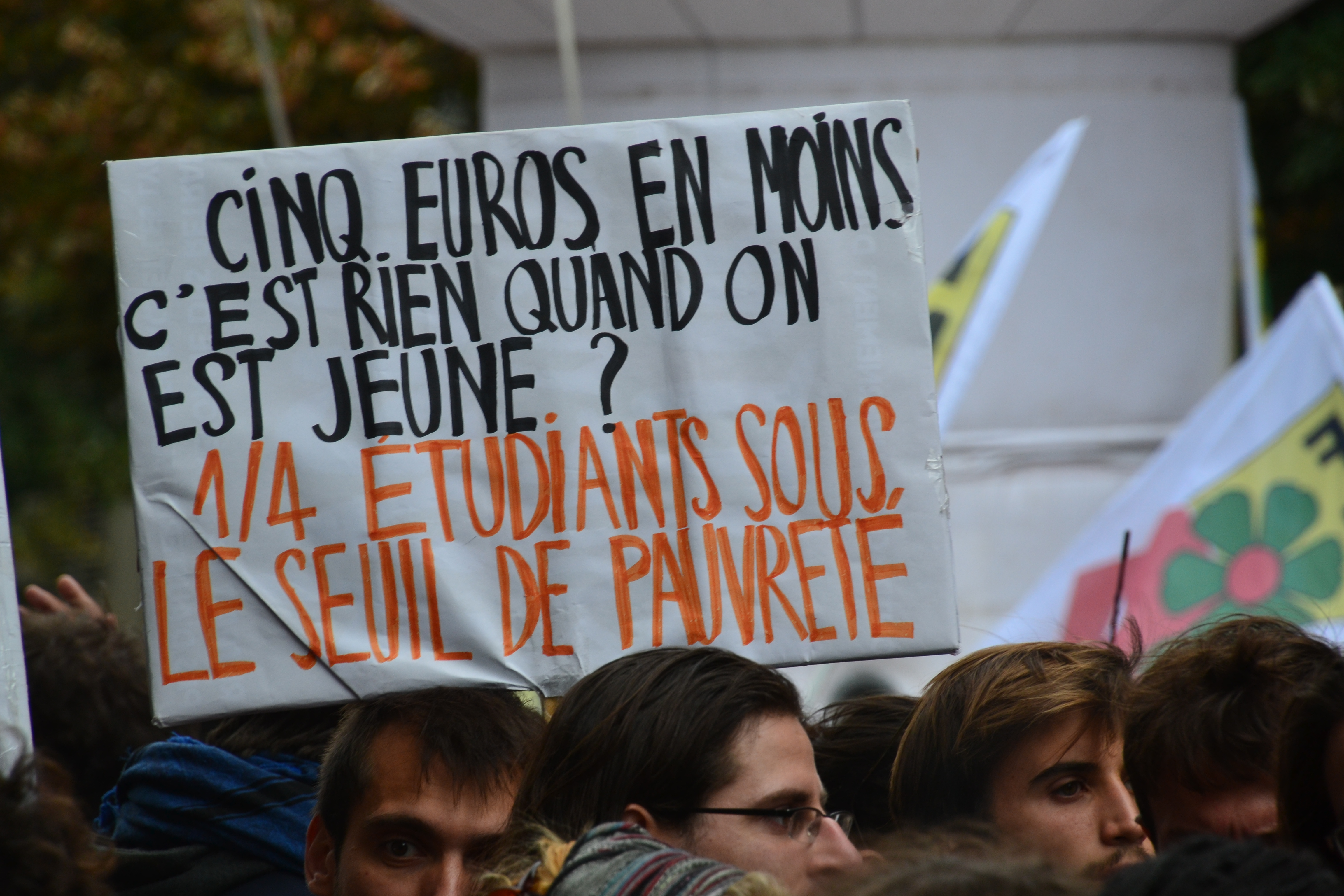 Paris, 12 septembre 2017 Manif contre les ordonnances Macron